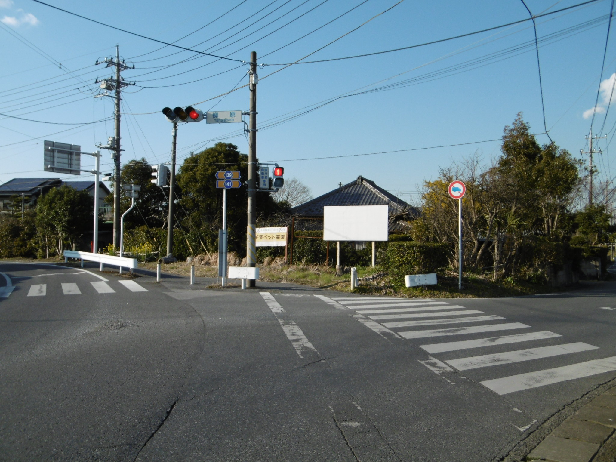 千葉県市原市柳原の交差点で接する千葉県道139号茂原五井線(左側)と千葉県道141号五井町田線(右側)。千葉県道141号はここで終点である。またどちらの道も先は国道297号(市原バイパス)へと繋がる。